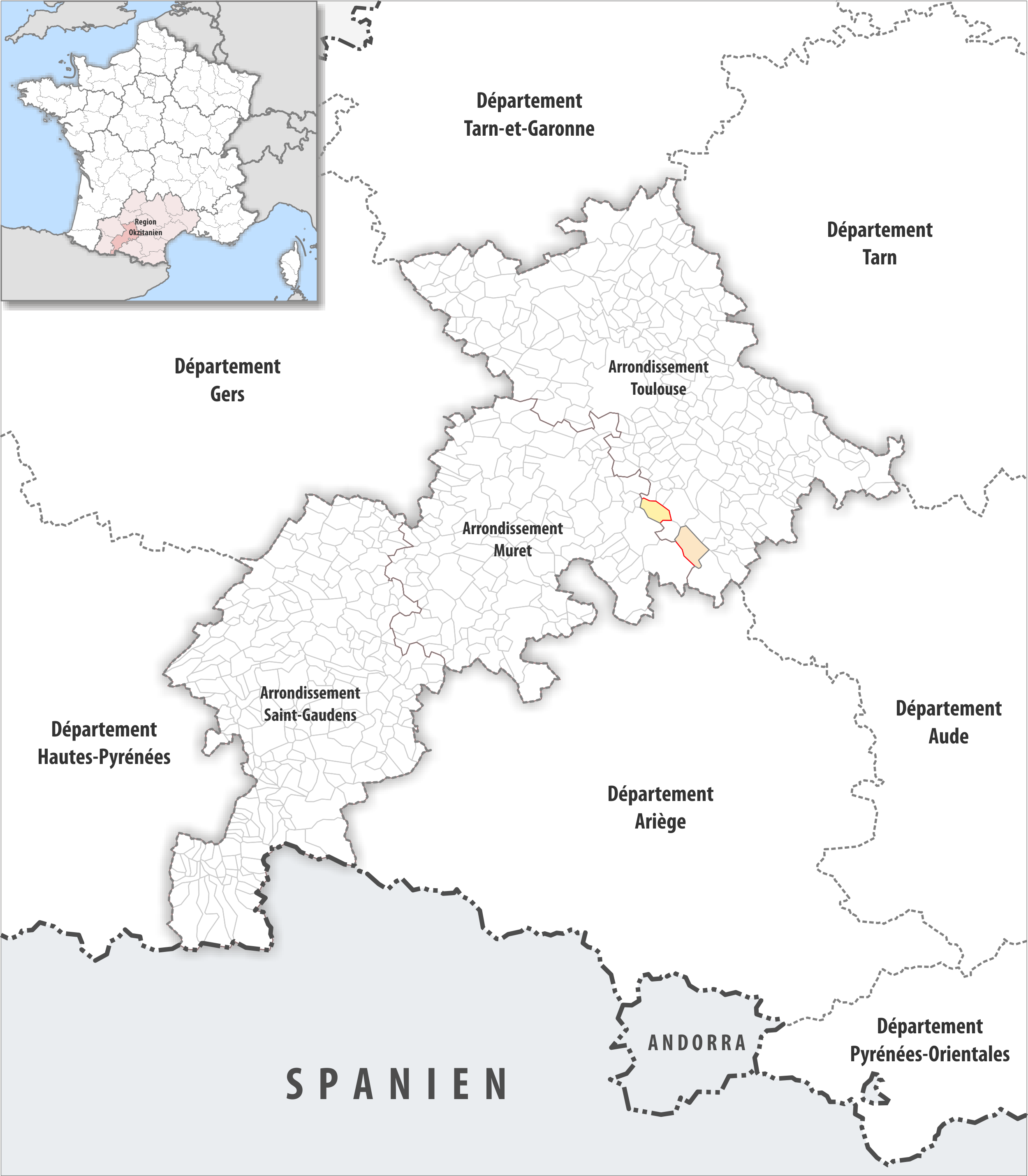 Arrondissements Anpassungen auf 2017 im Departement Haute-Garonne